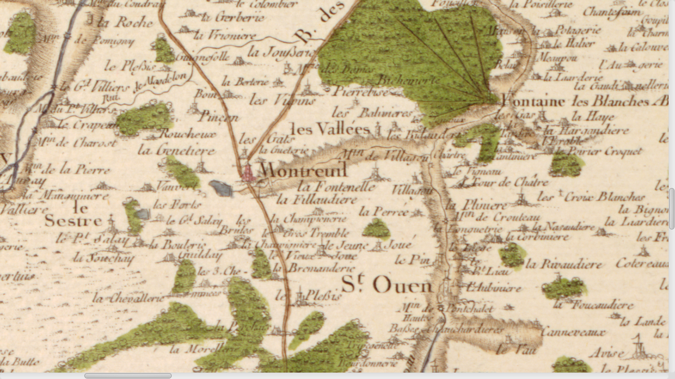 Carte de Cassini n°29, zoom sur Montreuil-en-Touraine, 1760.